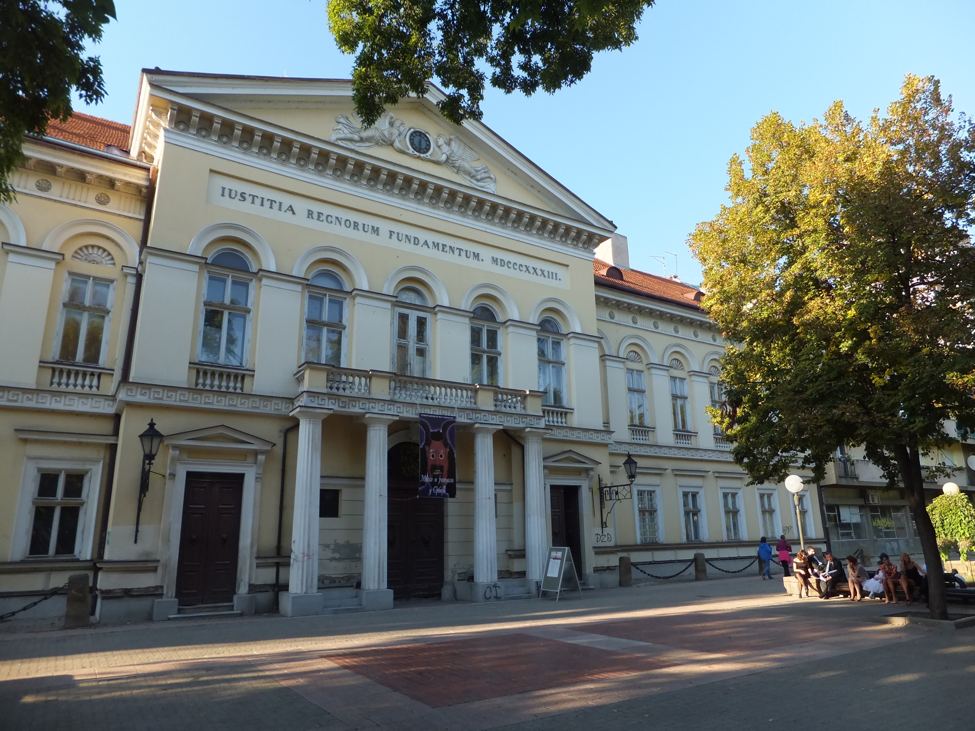 Зграда Магистрата у Панчеву